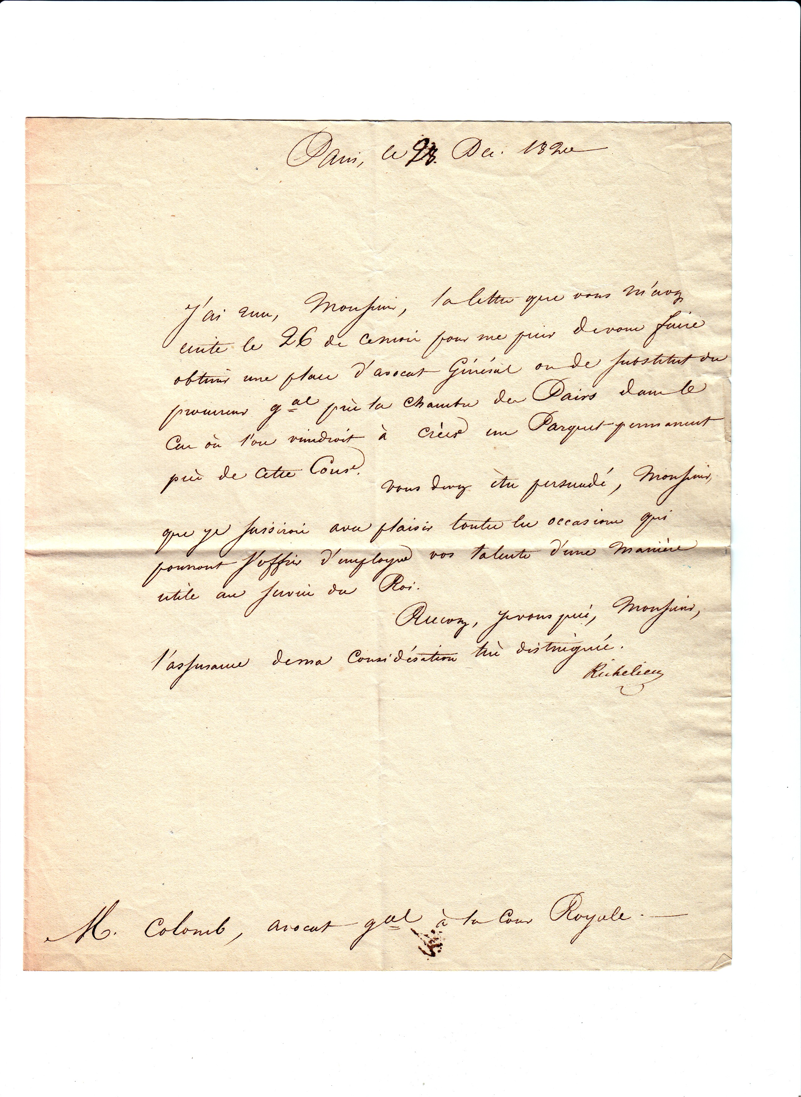 Письмо Армана Эмманюэль дю Плесси Ришельё, в качестве премьер-министра Франции 1820г.